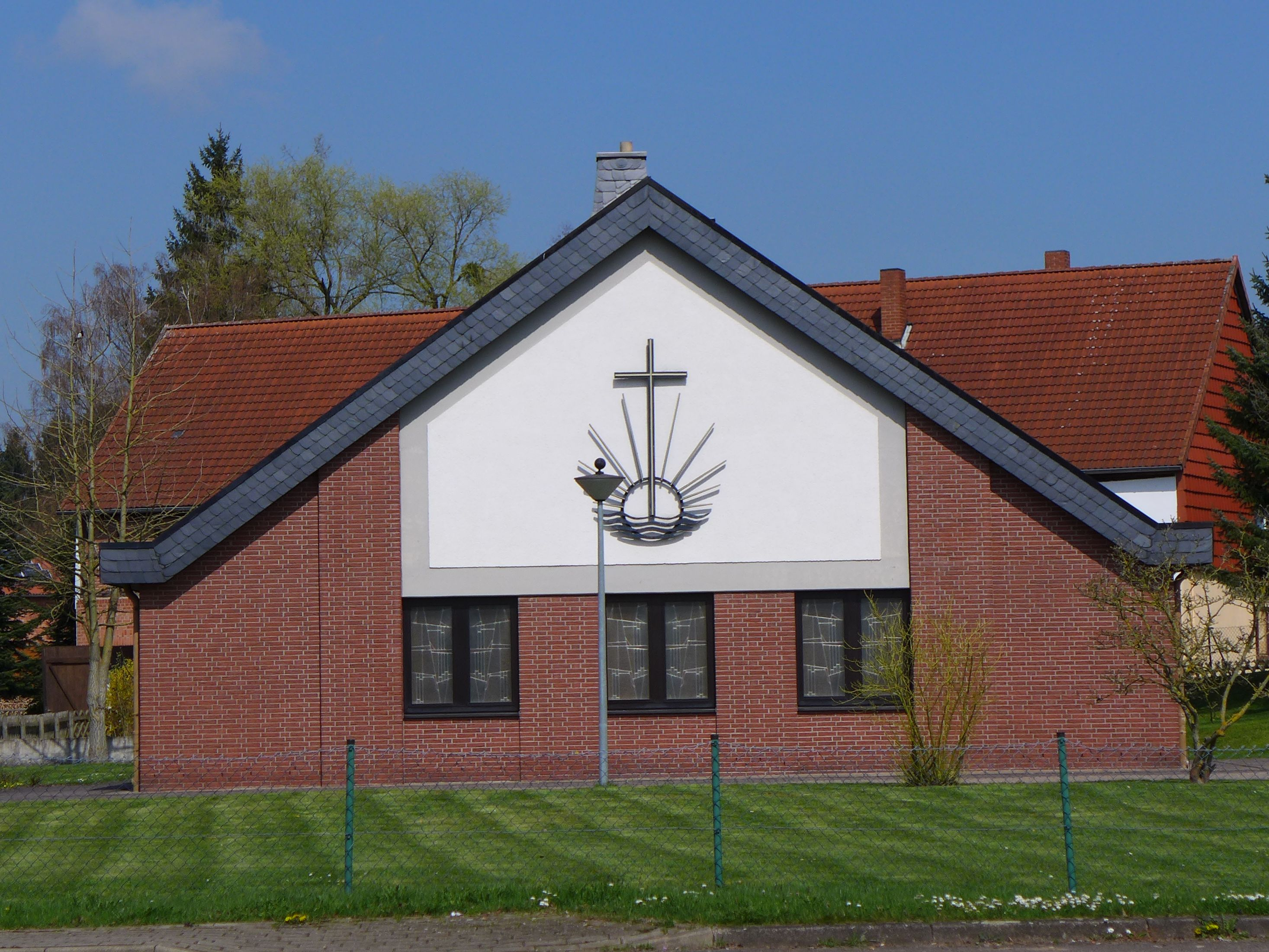 Kalefeld - Willershausen Neuapostolische Kirche